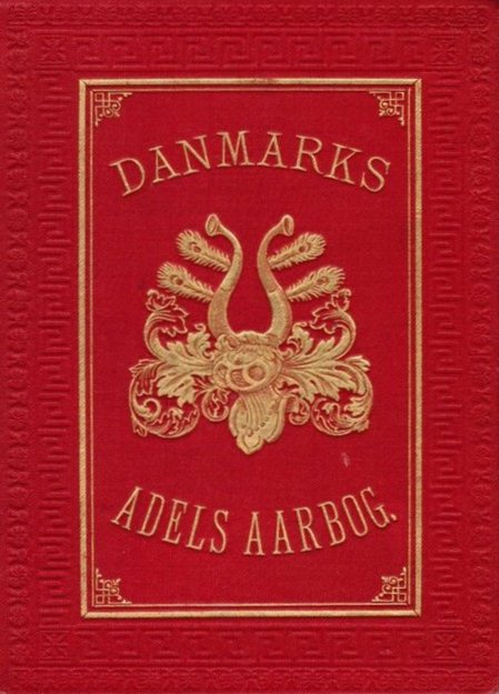 Danmarks Adels Aarbog. Tillæg til Danmarks Adels Aarbog. Dødsliste for aarene 1884 til 1908. Ved Hiort-Lorenzen. Kjøbenhavn, Vilh. Tryde, 1910.